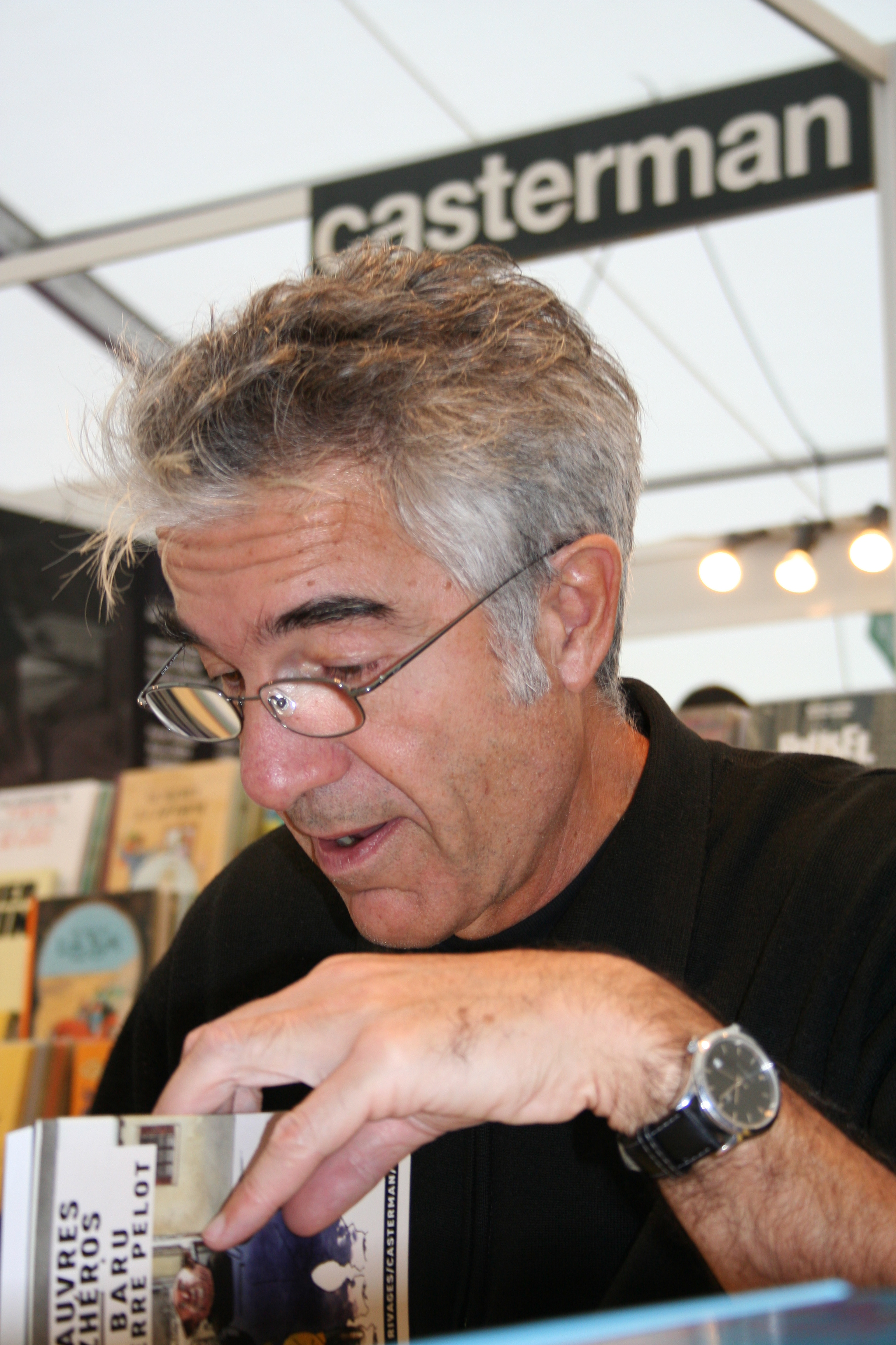 Baru, auteur de bande dessinée, lors du salon Quai des Bulles à Saint-malo, France, en octobre 2008